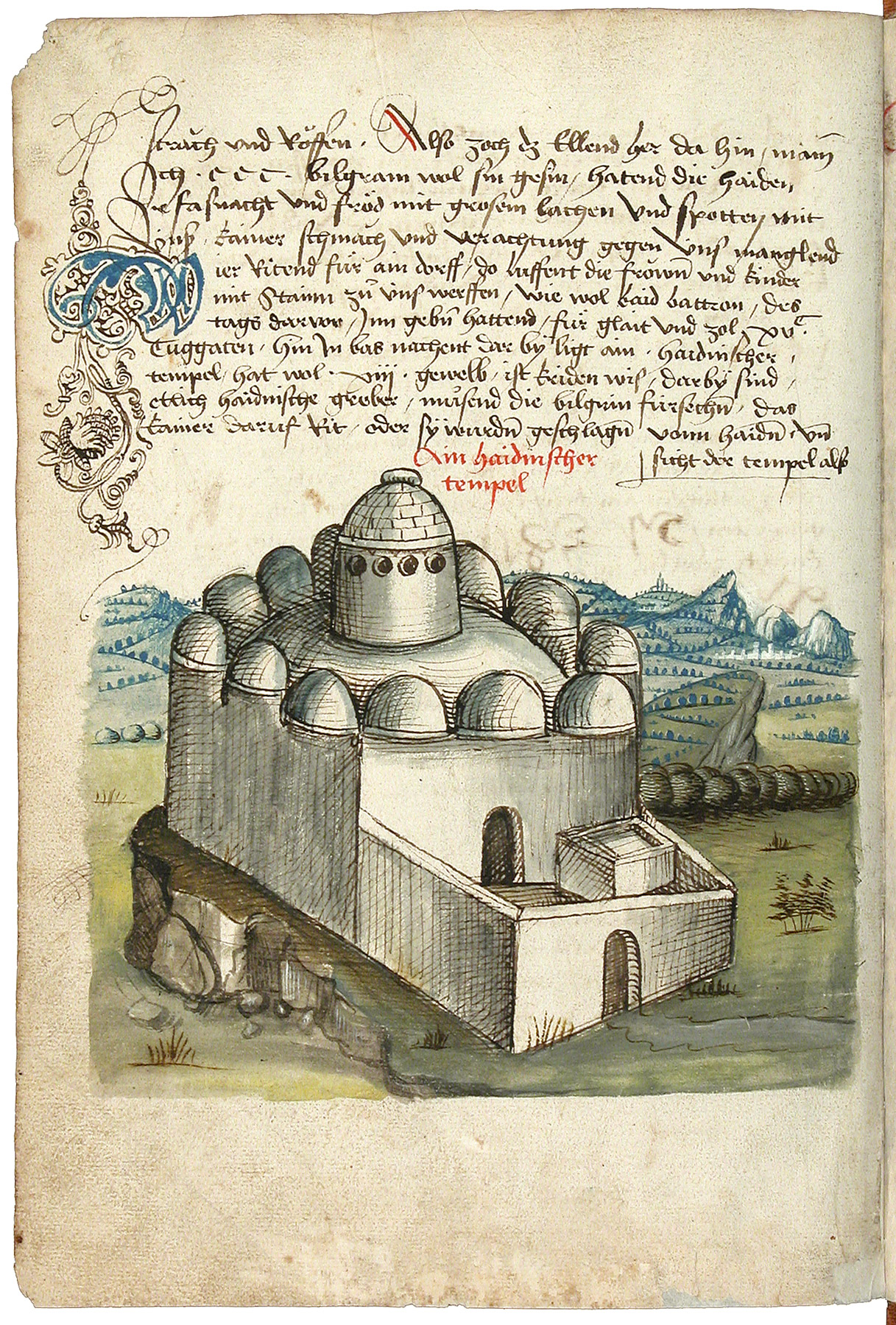 Schilderung einer Pilgerreise von Konstanz nach Jerusalem durch Konrad von Grünenberg, um 1487 Konrad von Grünenberg: Beschreibung der Reise von Konstanz nach Jerusalem - Cod. St. Peter, pap. 32. Handschrift, Bodenseegebiet (Konstanz?), um 1487. II + 53 Blätter, 32x21, mit 31 kolorierten Zeichnungen der Reiseroute von Venedig bis Palästina. Text in alemannischer Mundart.